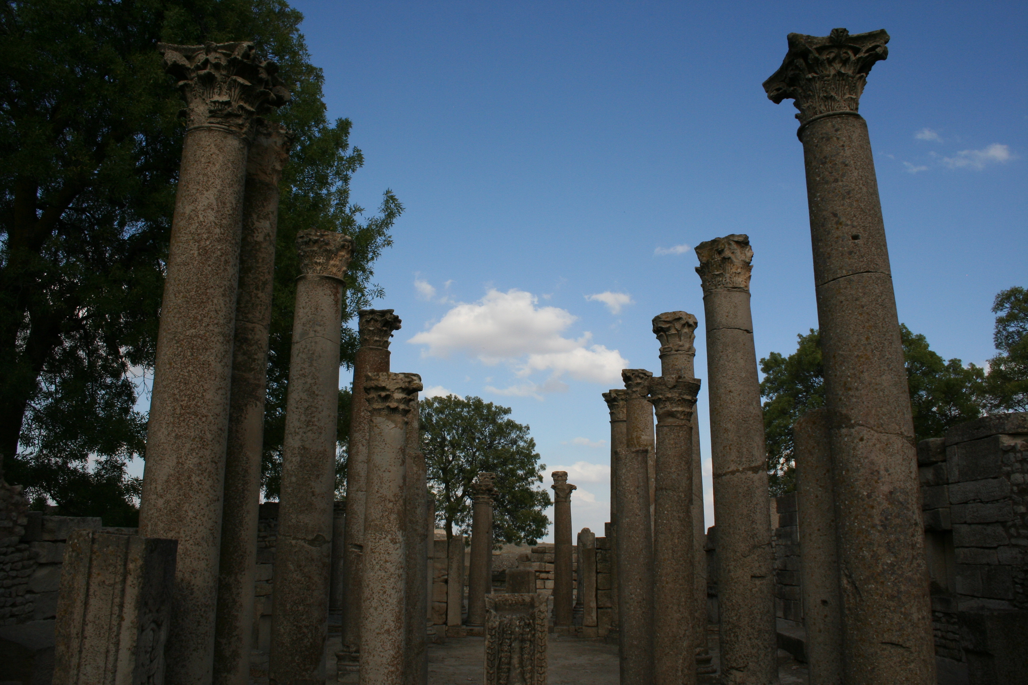 Schola des Juvenes à Makthar